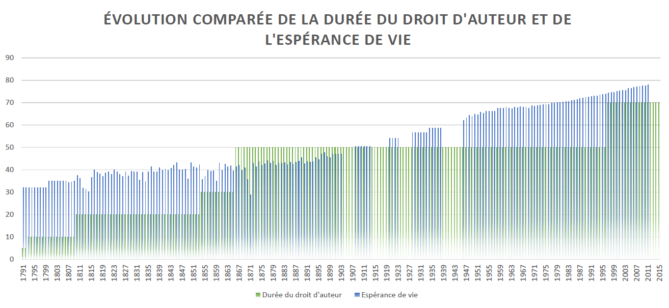 Travail personnel, d’après : Yves Blayo, "La mortalité en France de 1740 à 1829", in Population, vol.30, no spécial, p.141, disponible sur 4663_1975_hos_30_1_15697 Jacques Vallin, France Meslé, Reconstitution des tables annuelles de mortalité pour la France au XIXe siècle, Population, vol. 44, no6, p. 1136, disponible sur INSEE, "Espérance de vie à divers âges", disponible sur